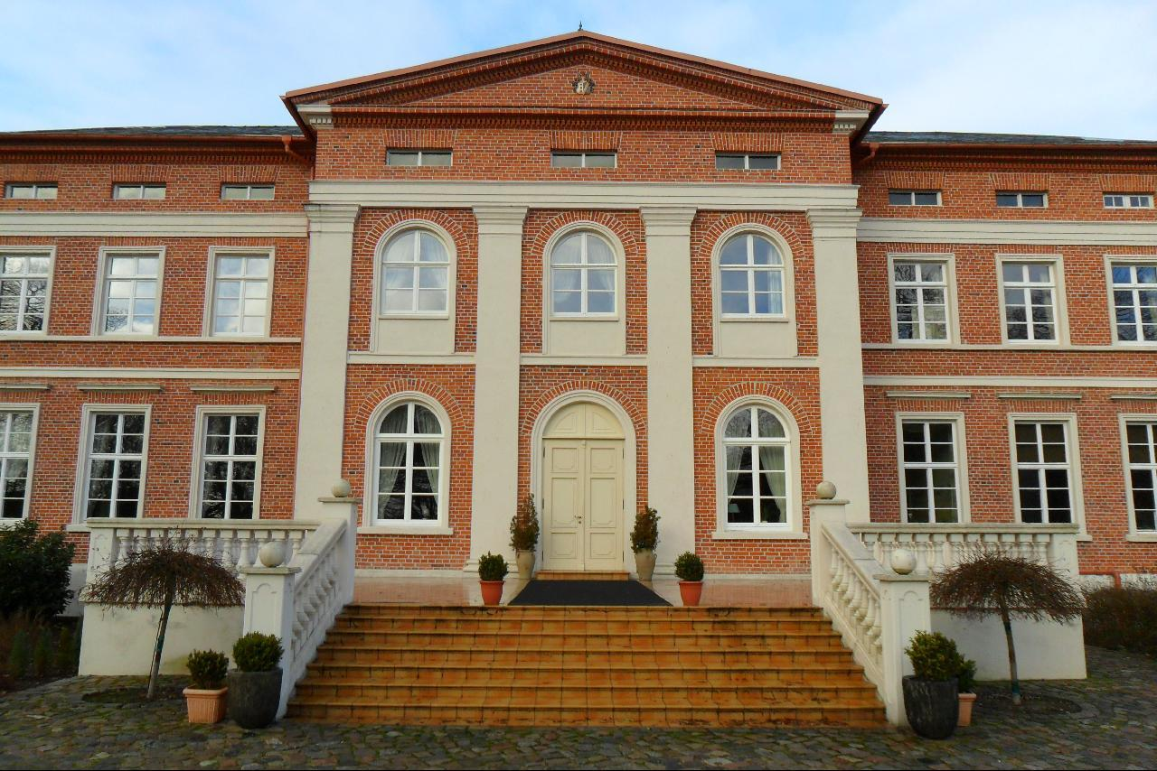 Herrenhaus Karow